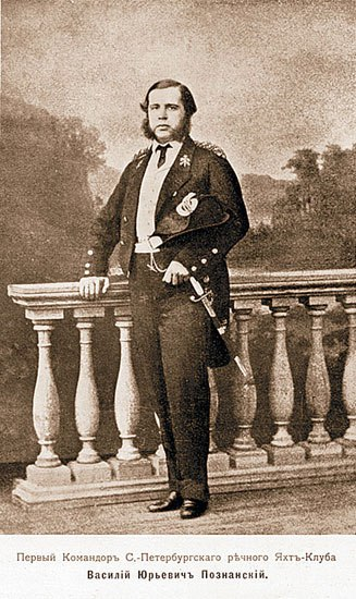 Василий Юрьевич Познанский (28.10.1828–27.10.1900)